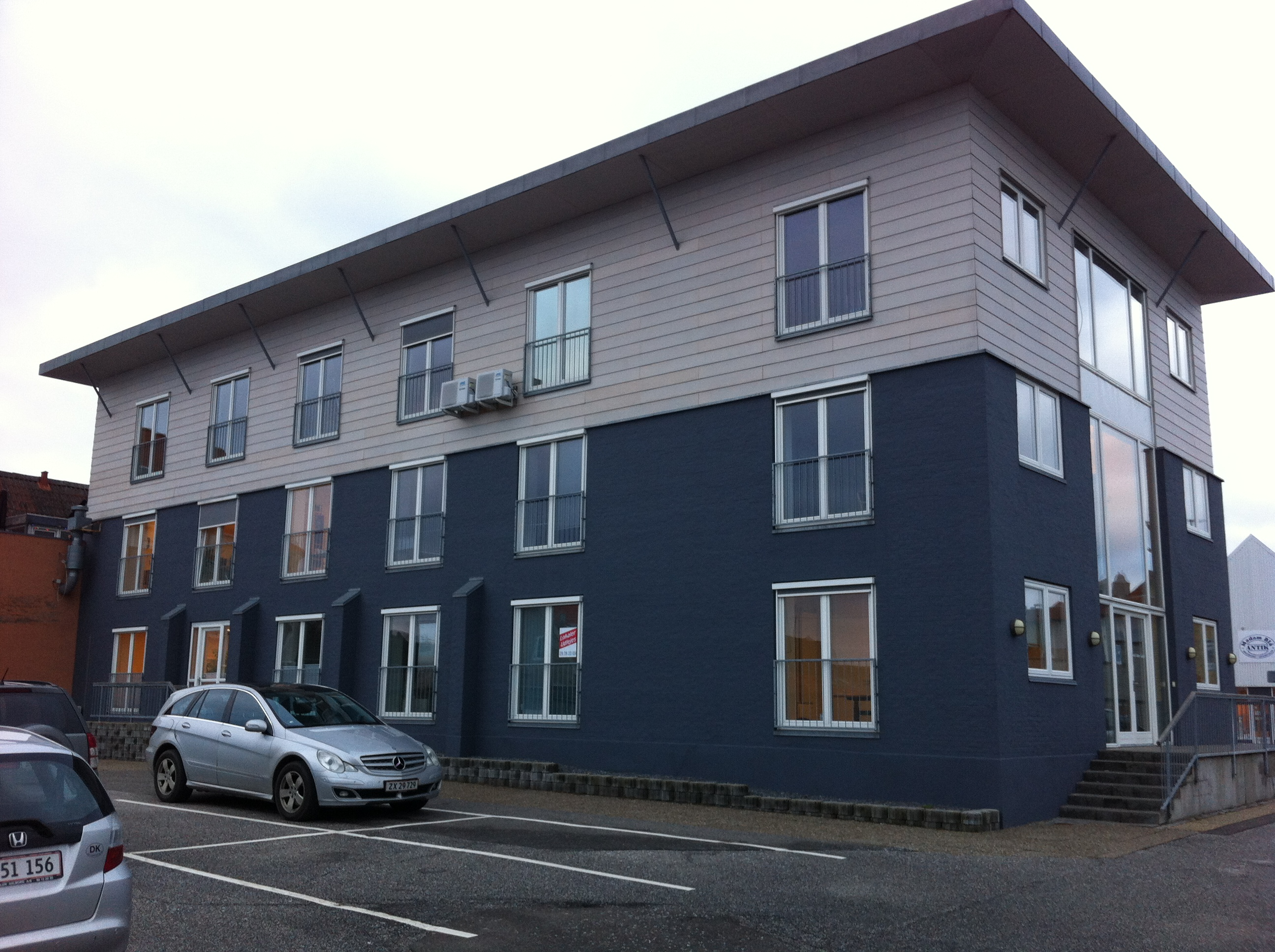 Jacob Møllers Gård er en af Hadsunds gamle købmandsgårde. er i dag et virksomhedsfælleskab